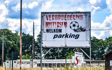 bord